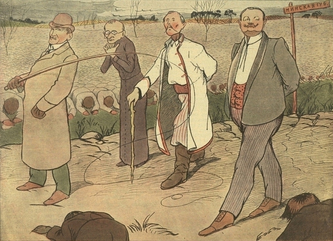 Сон Польского «кола» в весеннюю ночь: триумфальное шествие в Минскую губернию (Р. Дмовский, Я. Я. Гралевский, Я. Белявский, и гр. Г. Р. Потоцкий).